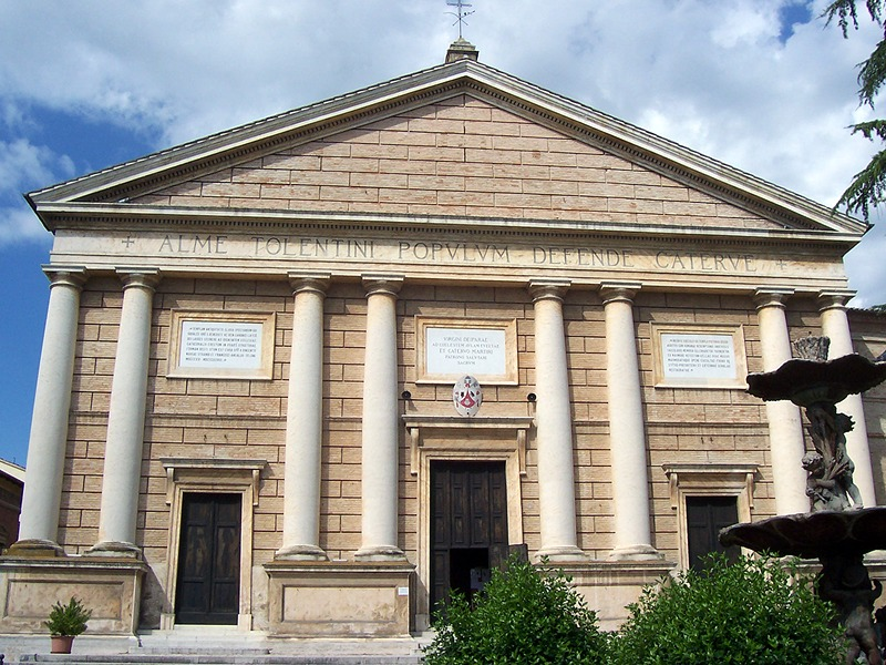 Tolentino - Cattedrale di S. Catervo